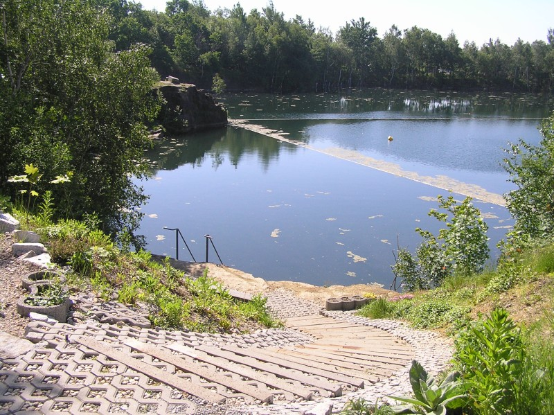 gefluteter Steinbruch Sparmann in Kamenz